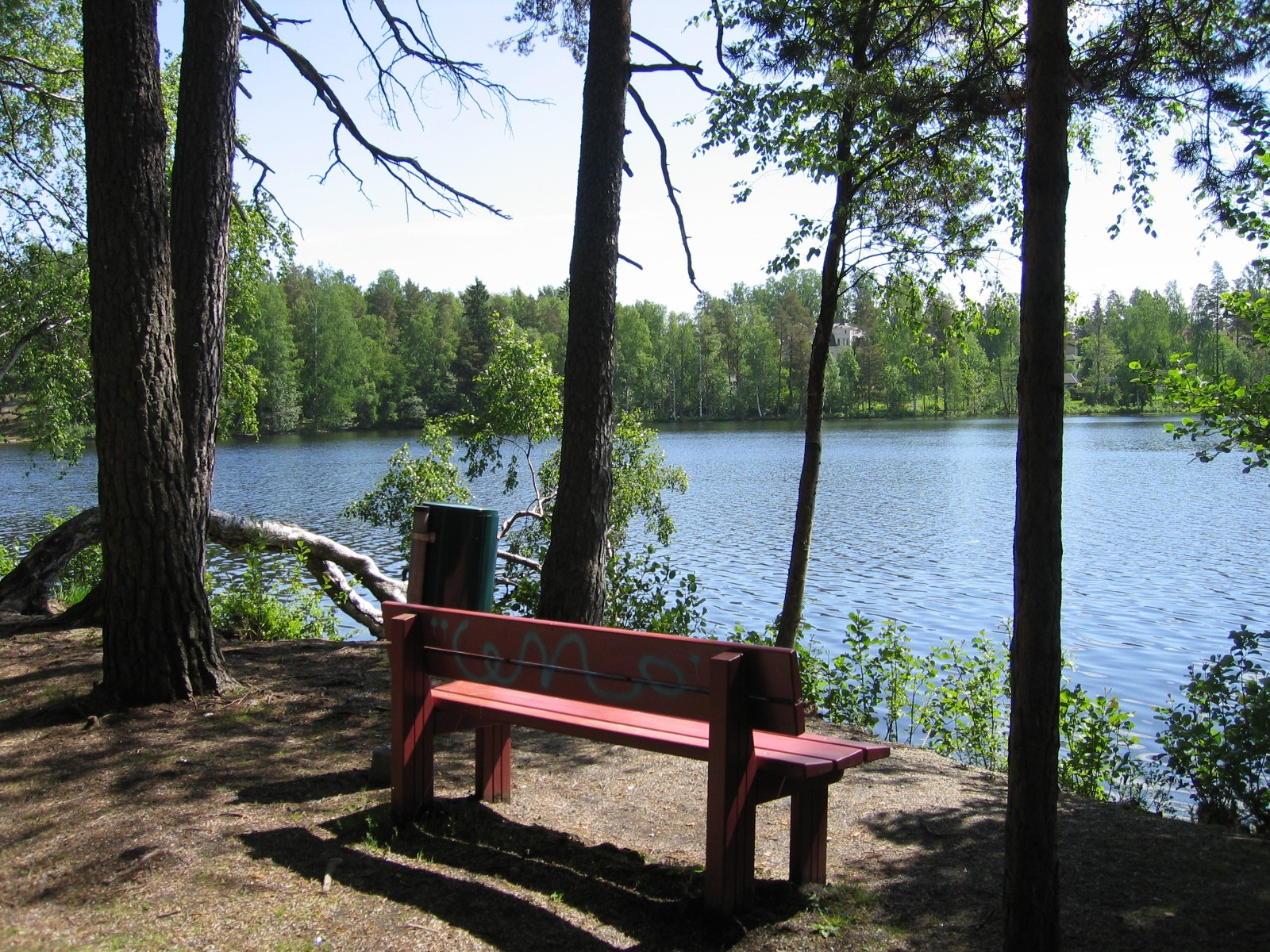 Lake Gallträsk in Kauniainen, Finland